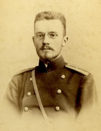 Александр Михайлович Колюбакин поручиком лейб-гвардии Измайловского полка.